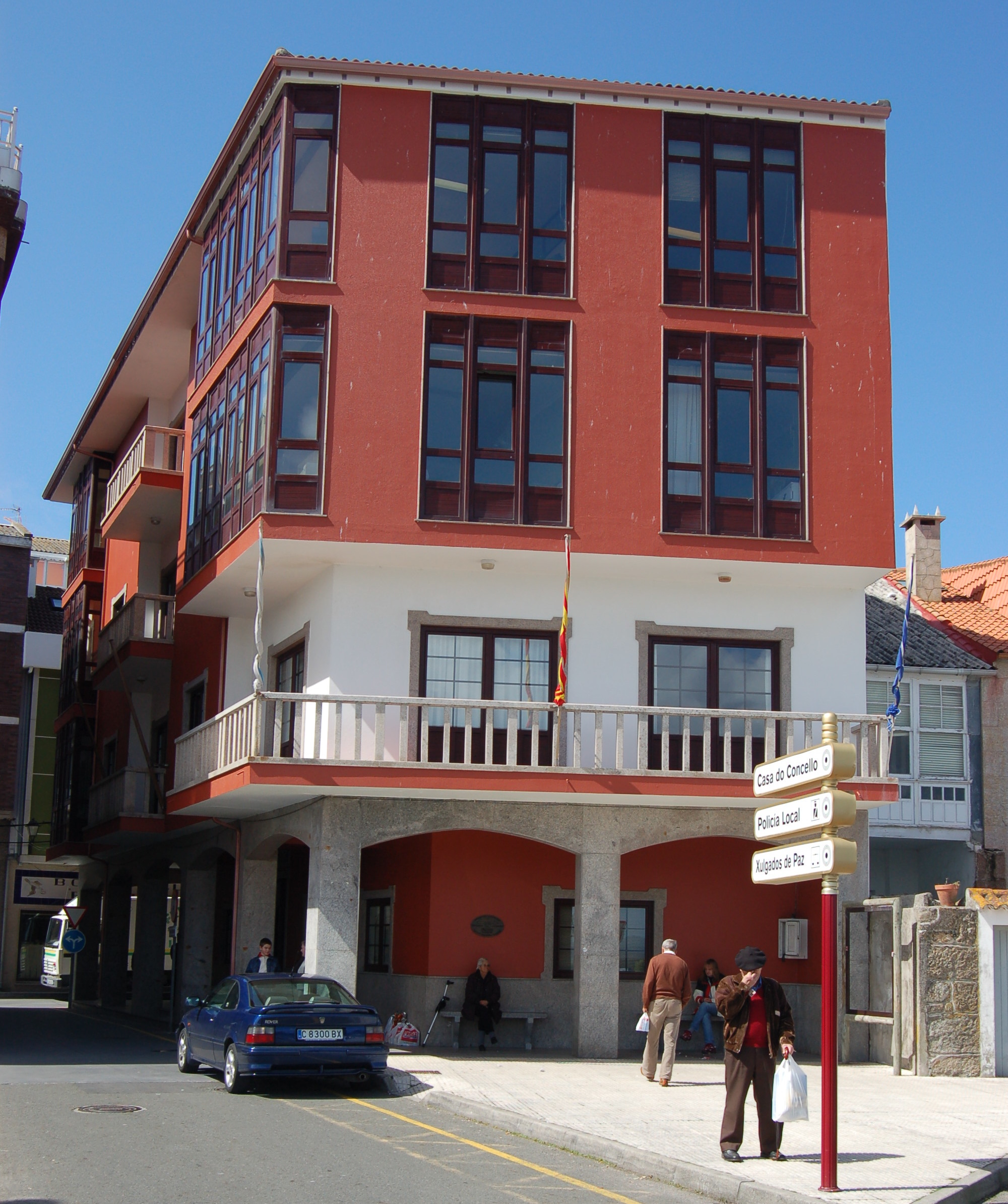 casa consistorial de Muxía Muxía Categoría:Imaxes de Muxía